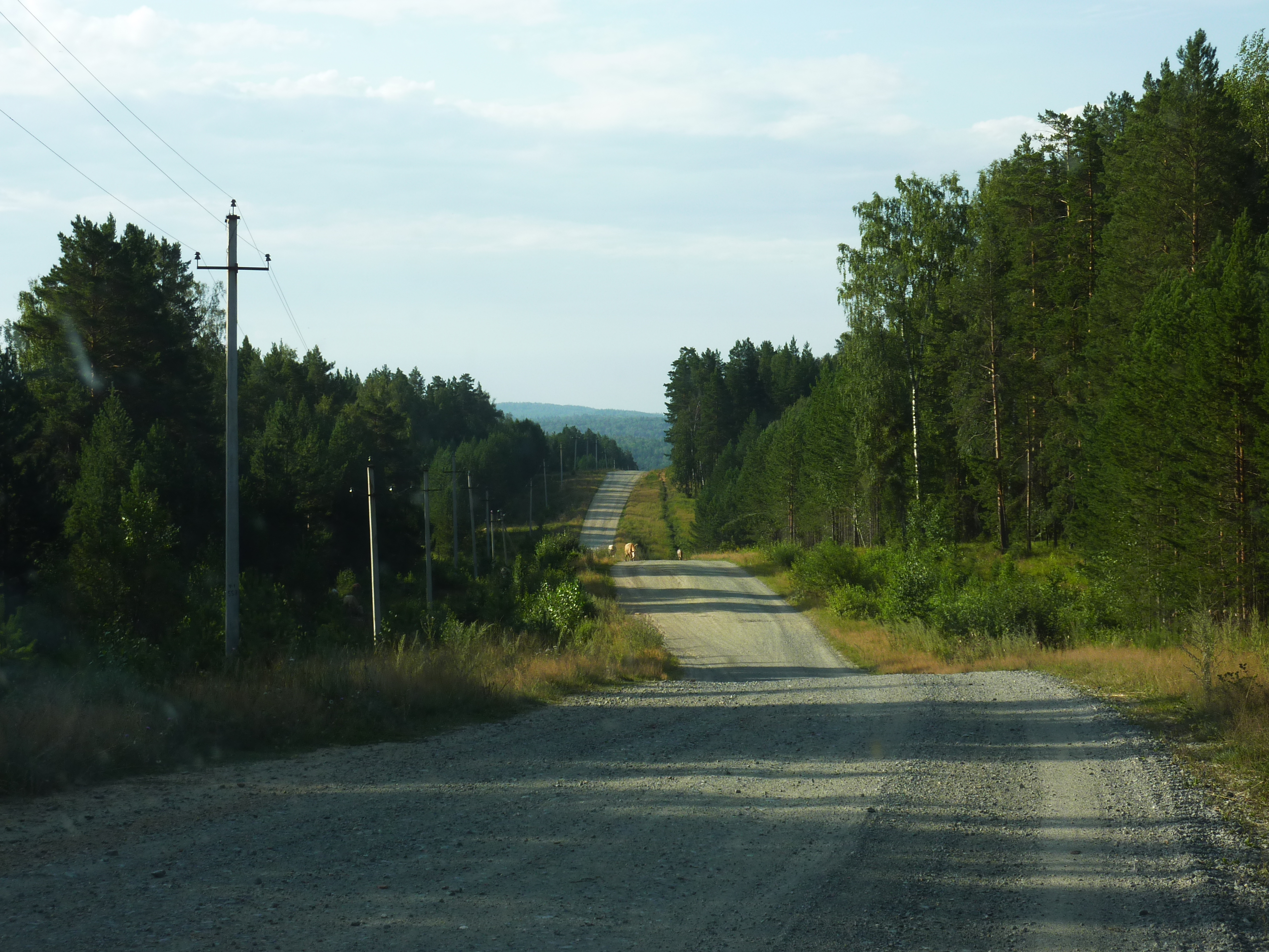 Спуск в Ишей. На границе Зилаирского и Баймакского районов.